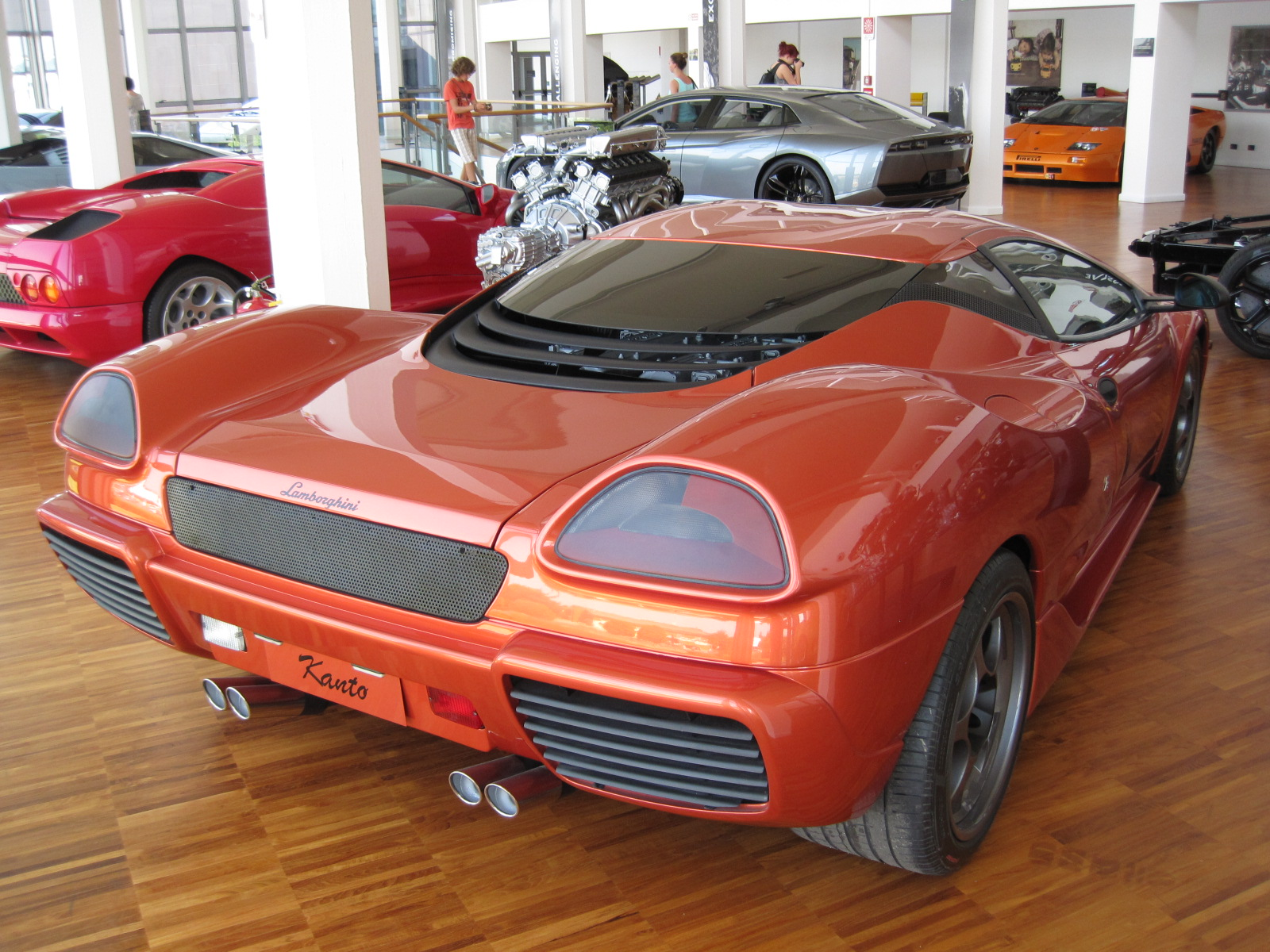 Musée Lamborghini - P147 Zagato / Canto - V12 / 6 litres - 1997